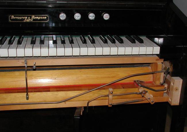 Mekanism för svällarluckan utanför registerluckorna i ett harmonium av Berggren & Bengzon, Säffle